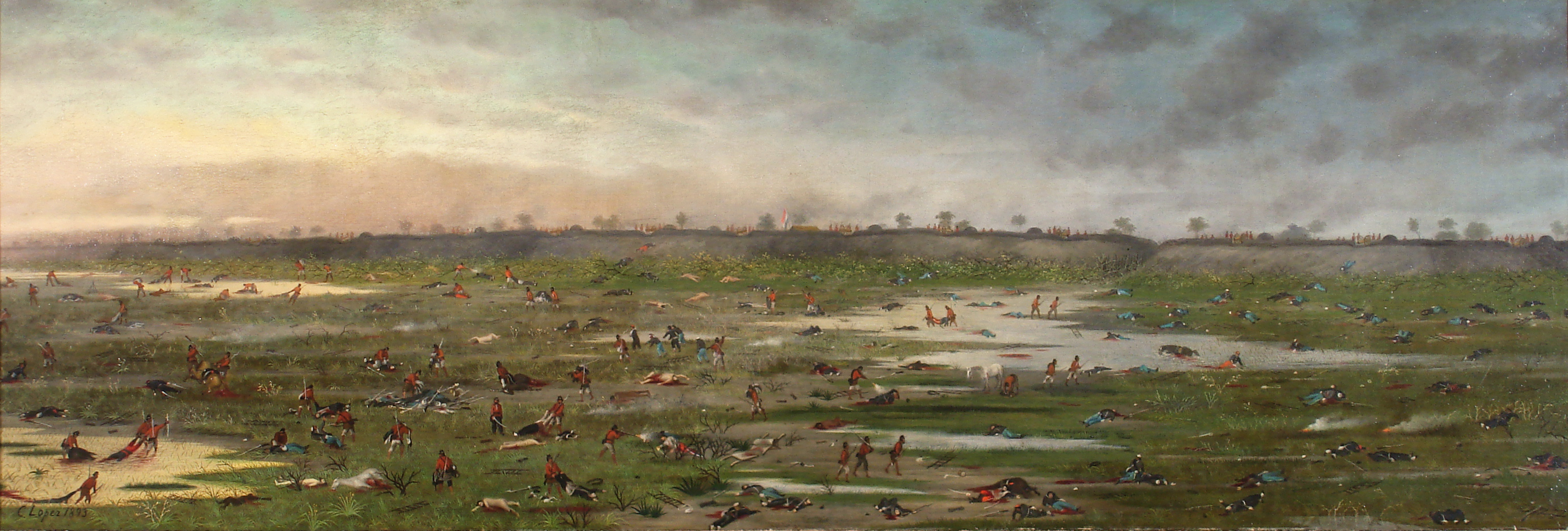 Cándido López, Después de la Batalla de Curupaytí. 1893. 50,6 x 149,5 cm, con marco: 52,6 x 151,5 cm, óleo sobre tela. Inv. 7122.